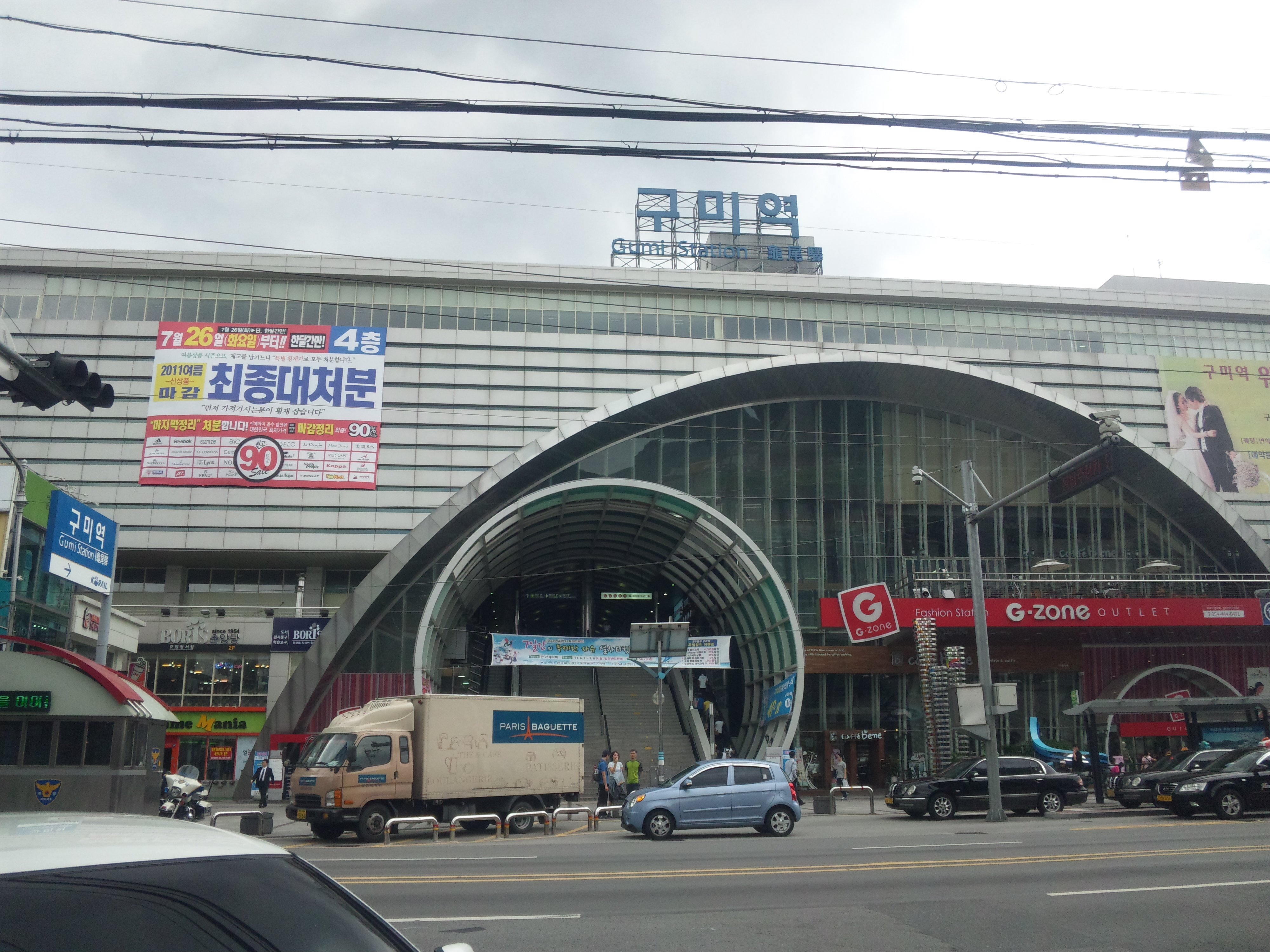 十年ぶりに訪れた亀尾駅は新築されて見違えるようでした。